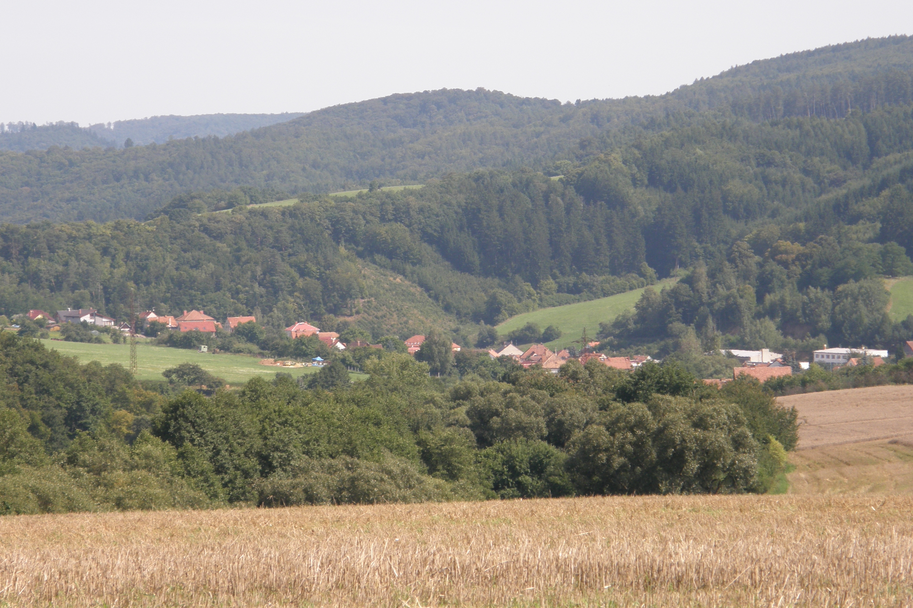 Šebrov v okrese Blansko